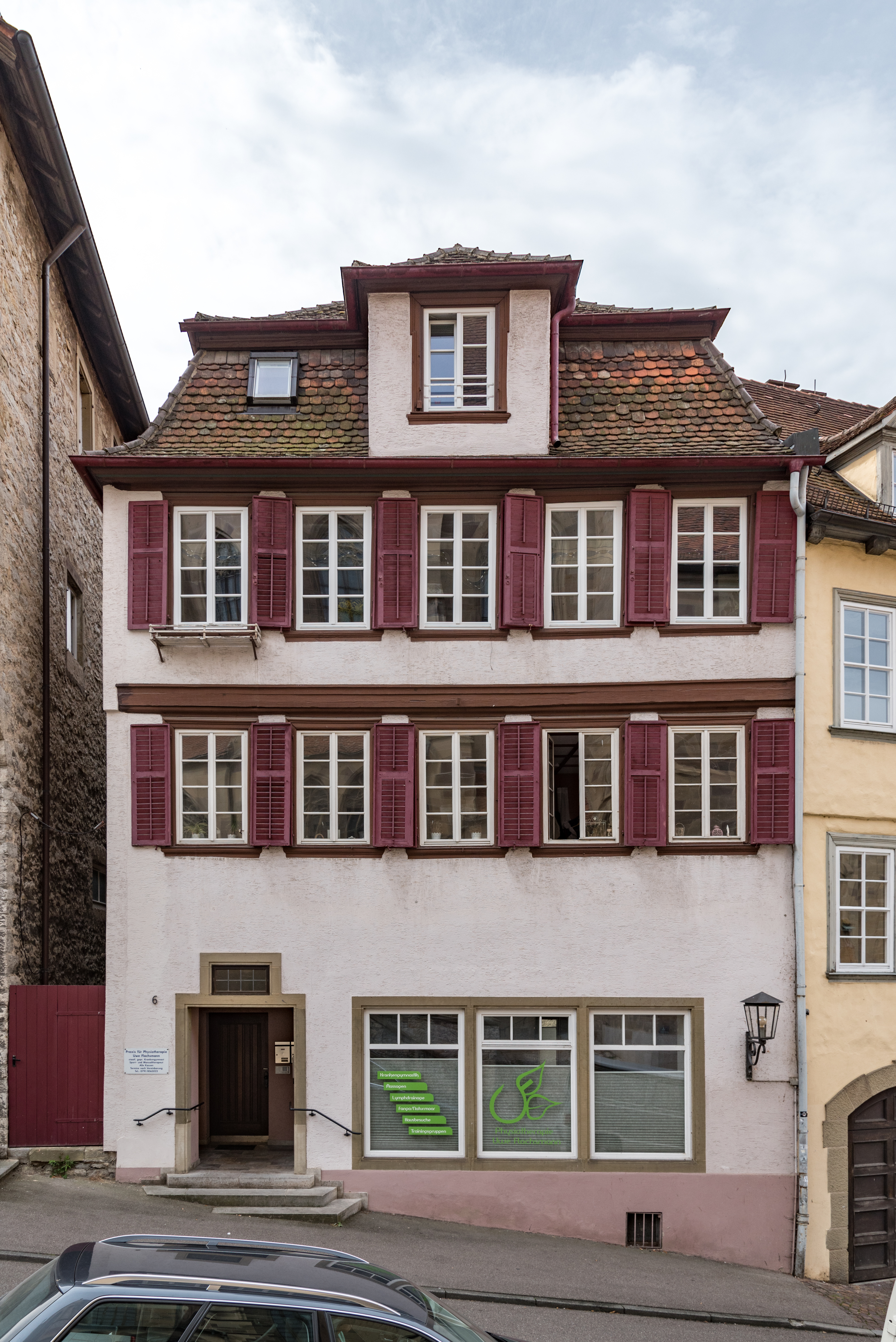 Schwäbisch Hall, Klosterstraße 6